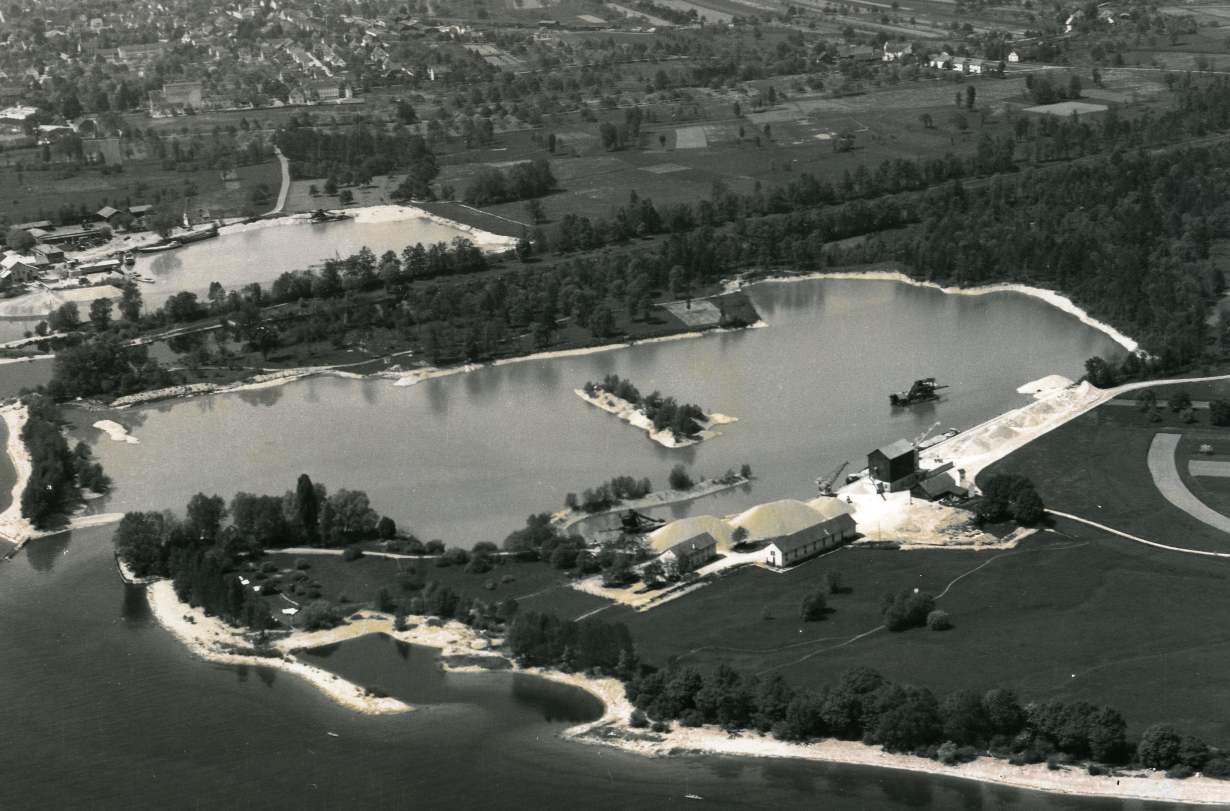 Hafen Gohren, Kressbronn am Bodensee 1952